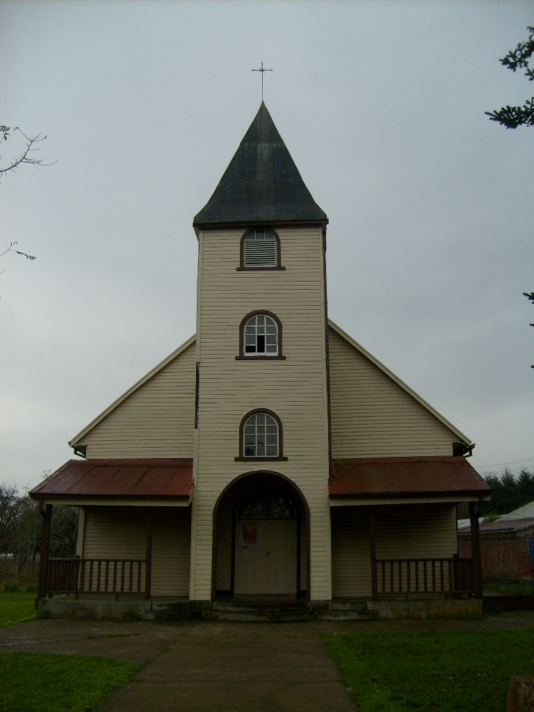 Iglesia de Pelchuquín. Fundada en 1863.